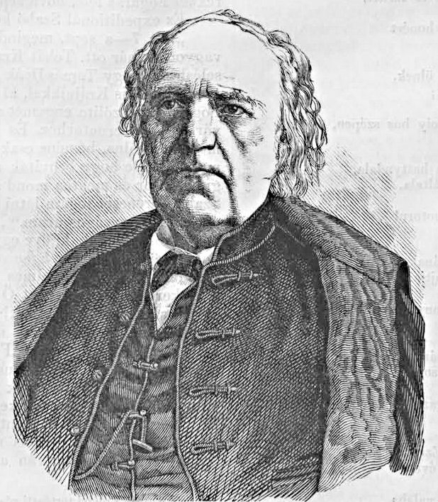 Bodola Sámuel (1790–1866) erdélyi református püspök, királyi tanácsos (Vasárnapi Ujság, 1861. június 30.)